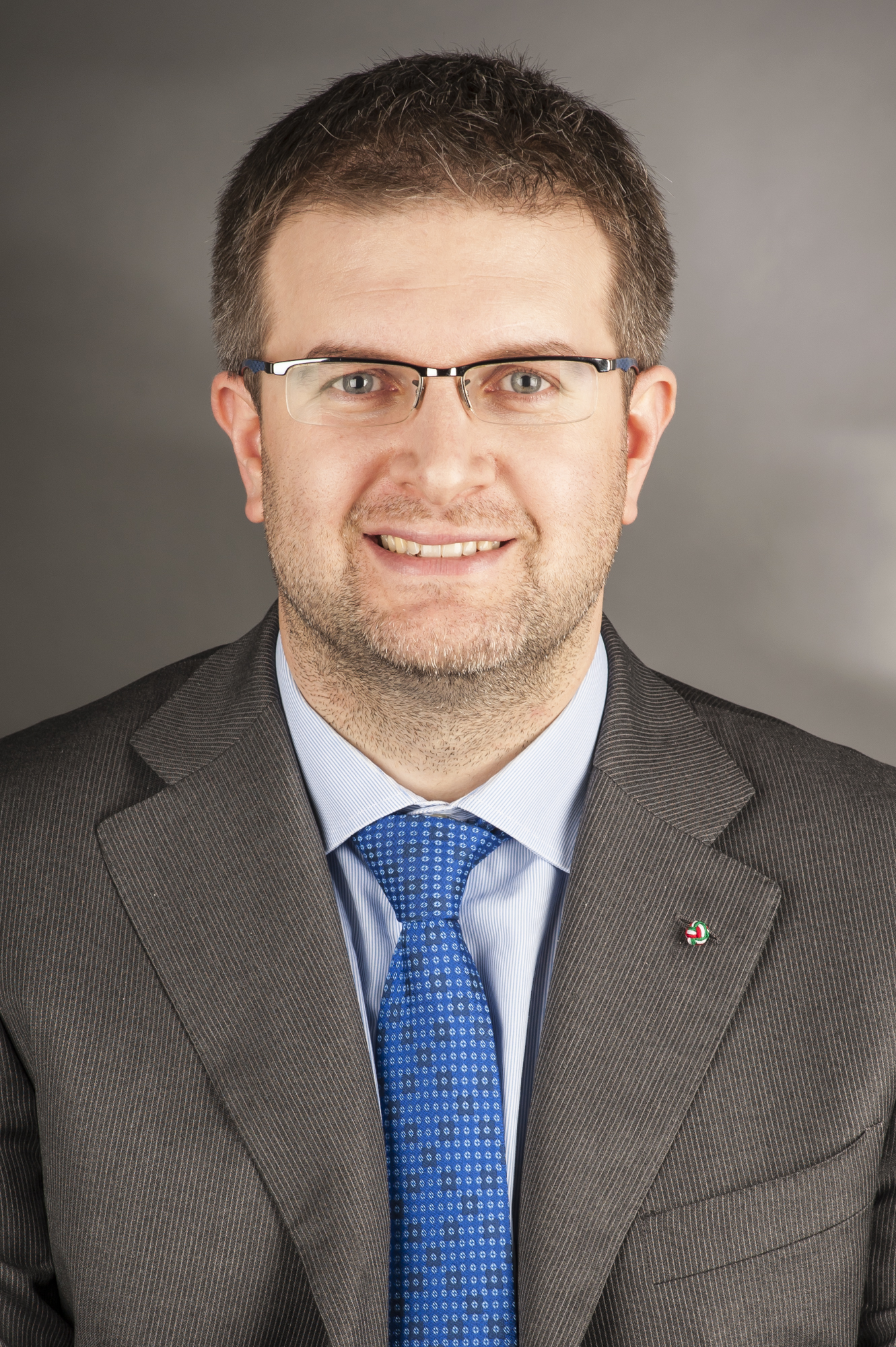 Carlo Fidanza